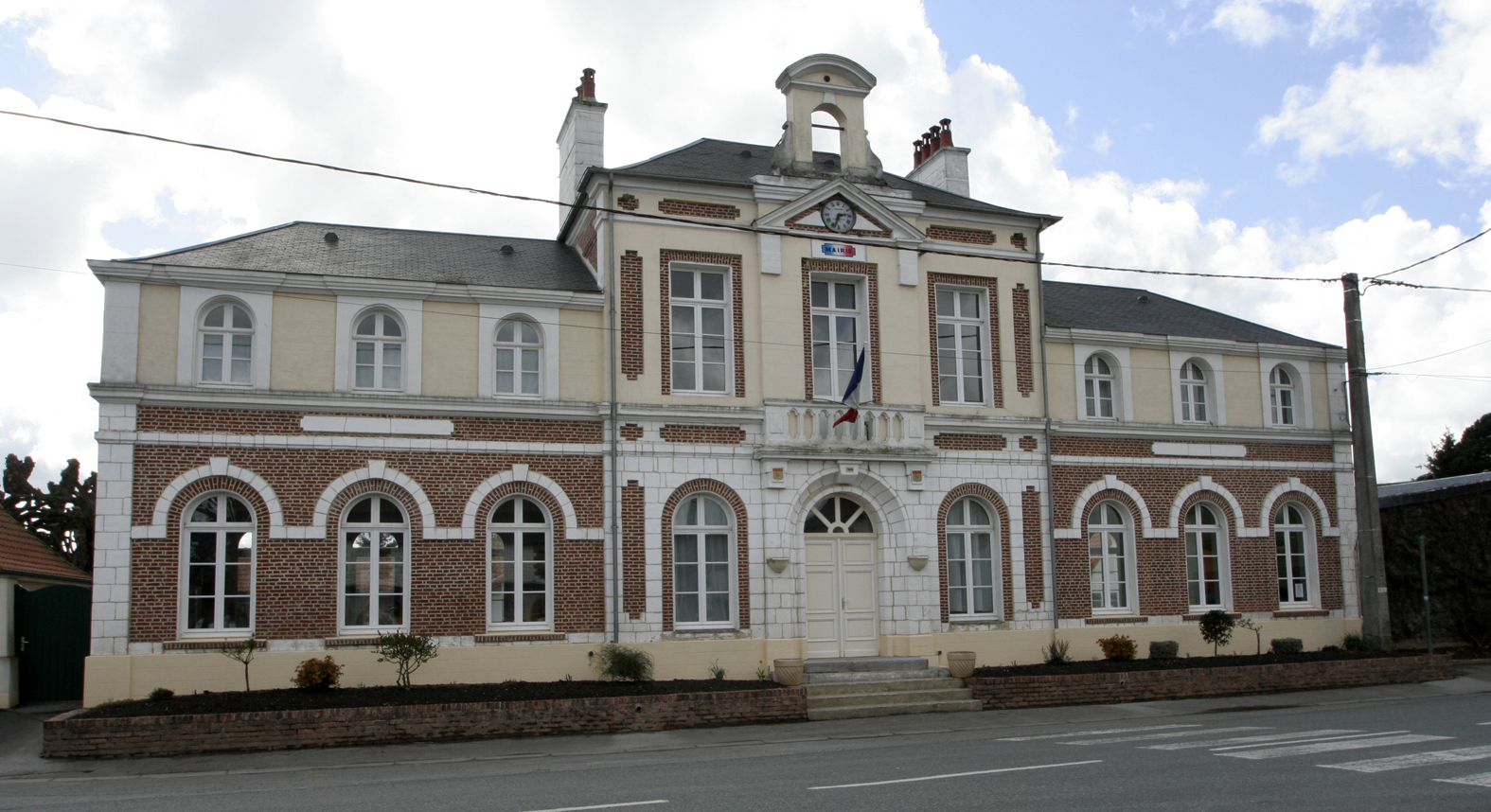 Montcavrel la mairie